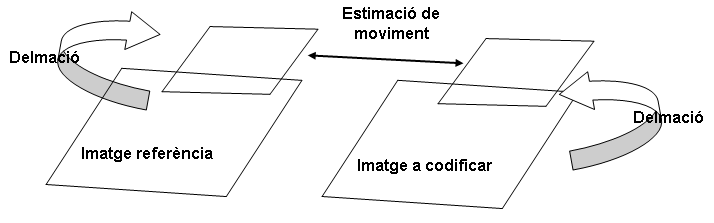 Esquema per entendre millor concepte fet amb word i grabat com a png mitjançant el paint